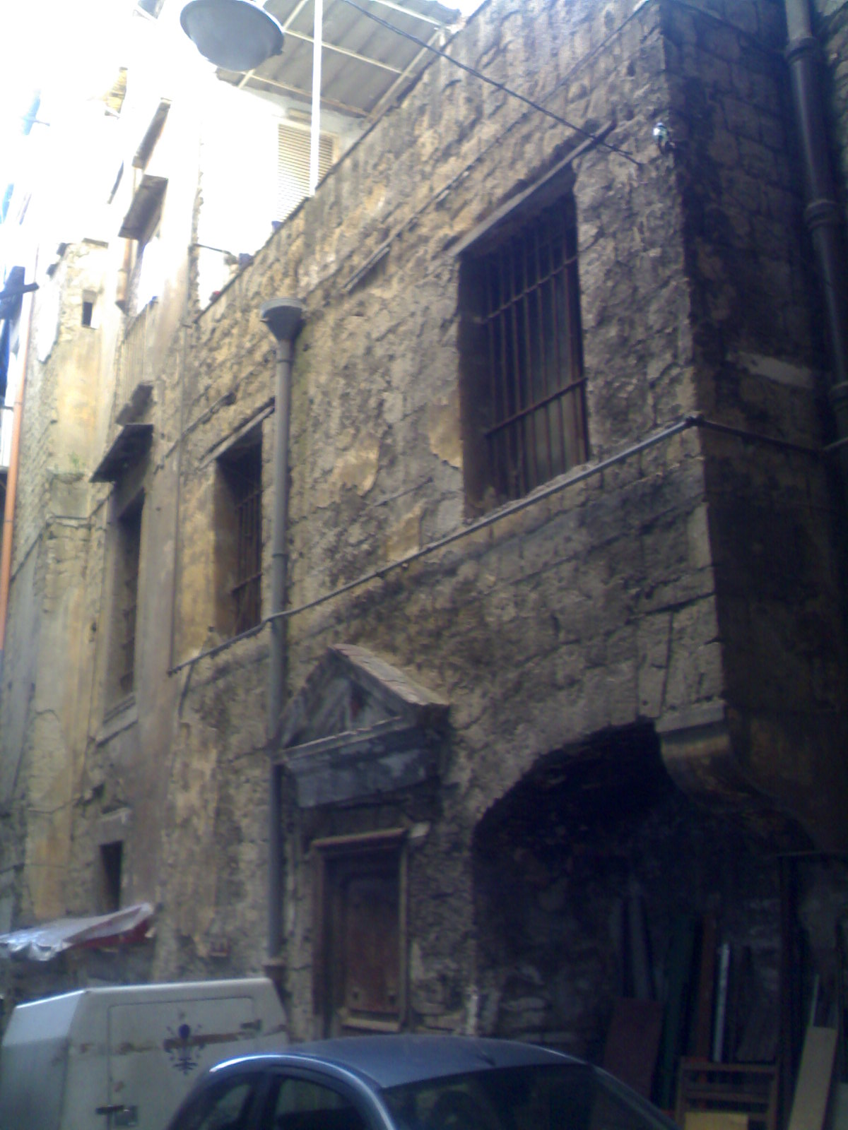 Chiesa di Palazzo Spinelli di Laurino (Napoli)